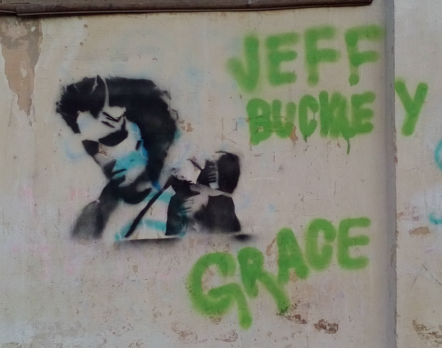 Граффитти с изображением Джеффа Бакли. Россия, РБ, Октябрьский, здание кинотеатра "Фонтан".